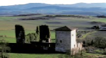 Gebara jauregia